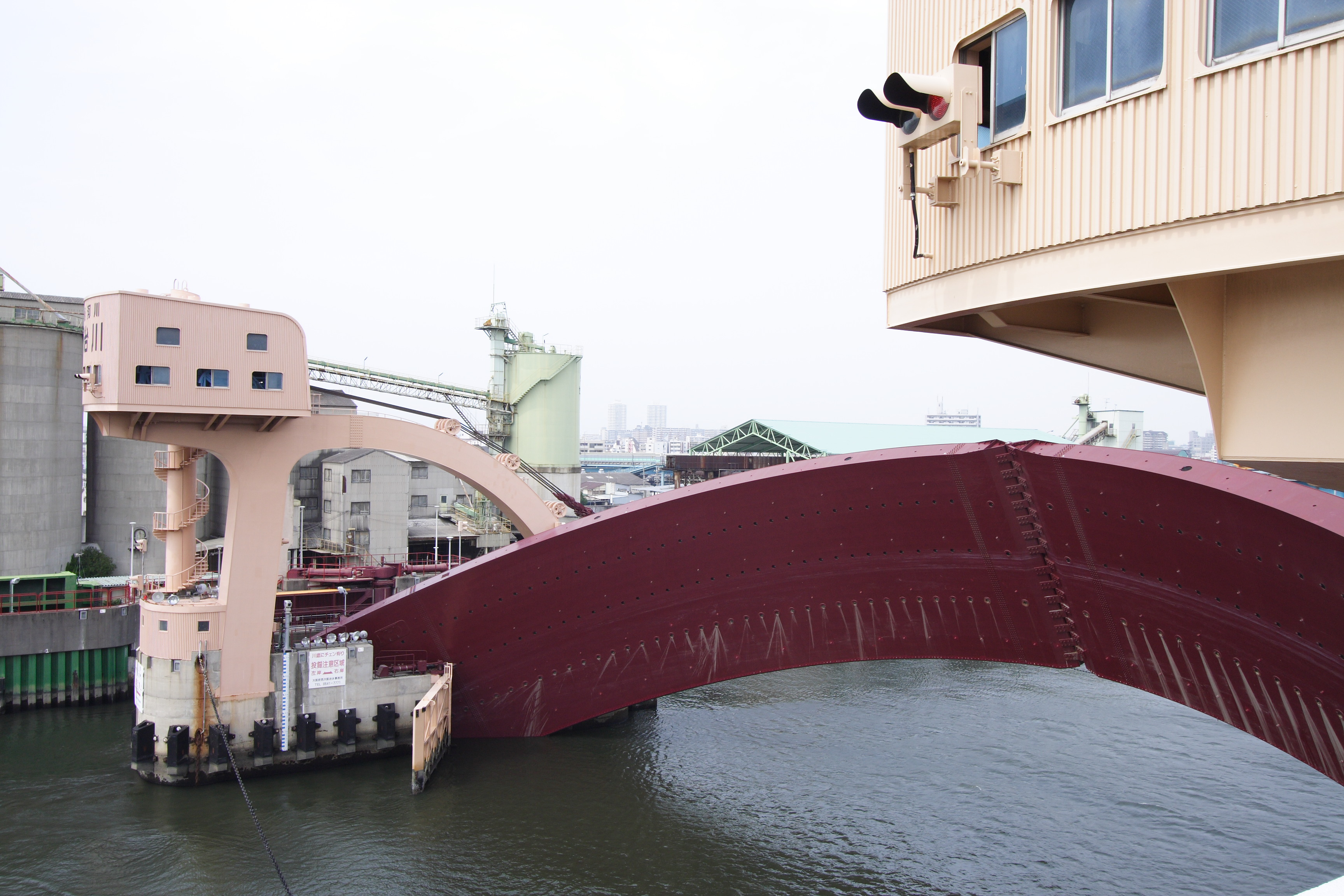 Ajigawa Suimon Gates/ 安治川水門